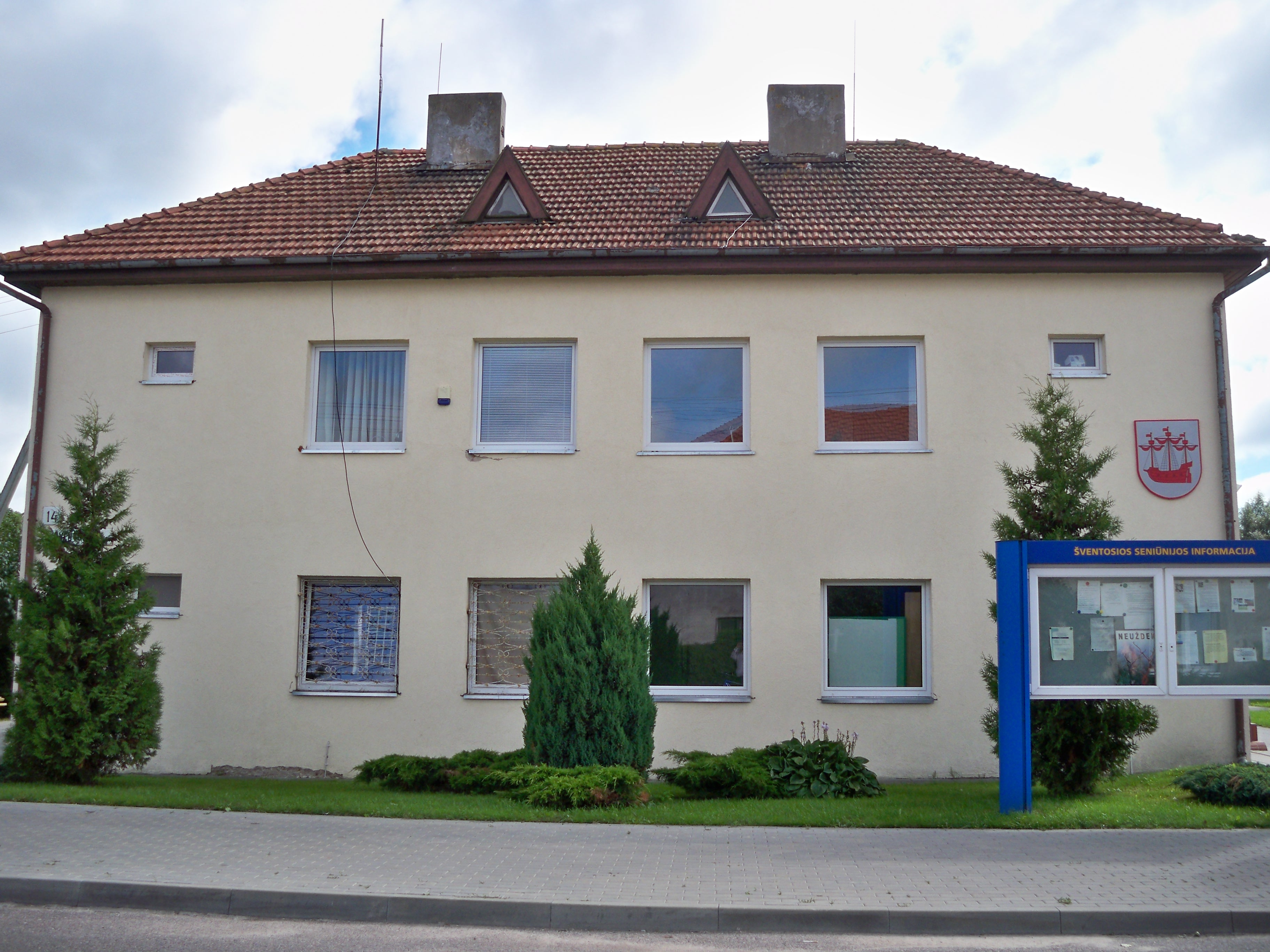 Šventosios seniūnijos pastatas